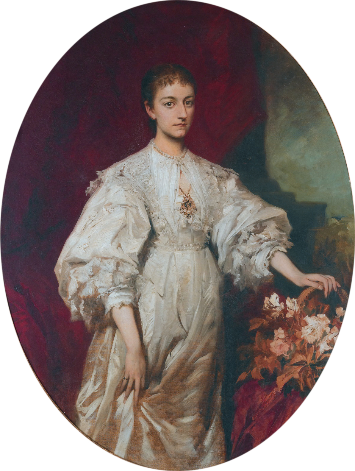 Chariclée Fürstin zu Hohenlohe-Schillingsfürst, née Princess Ypsilanti (1863-1912)